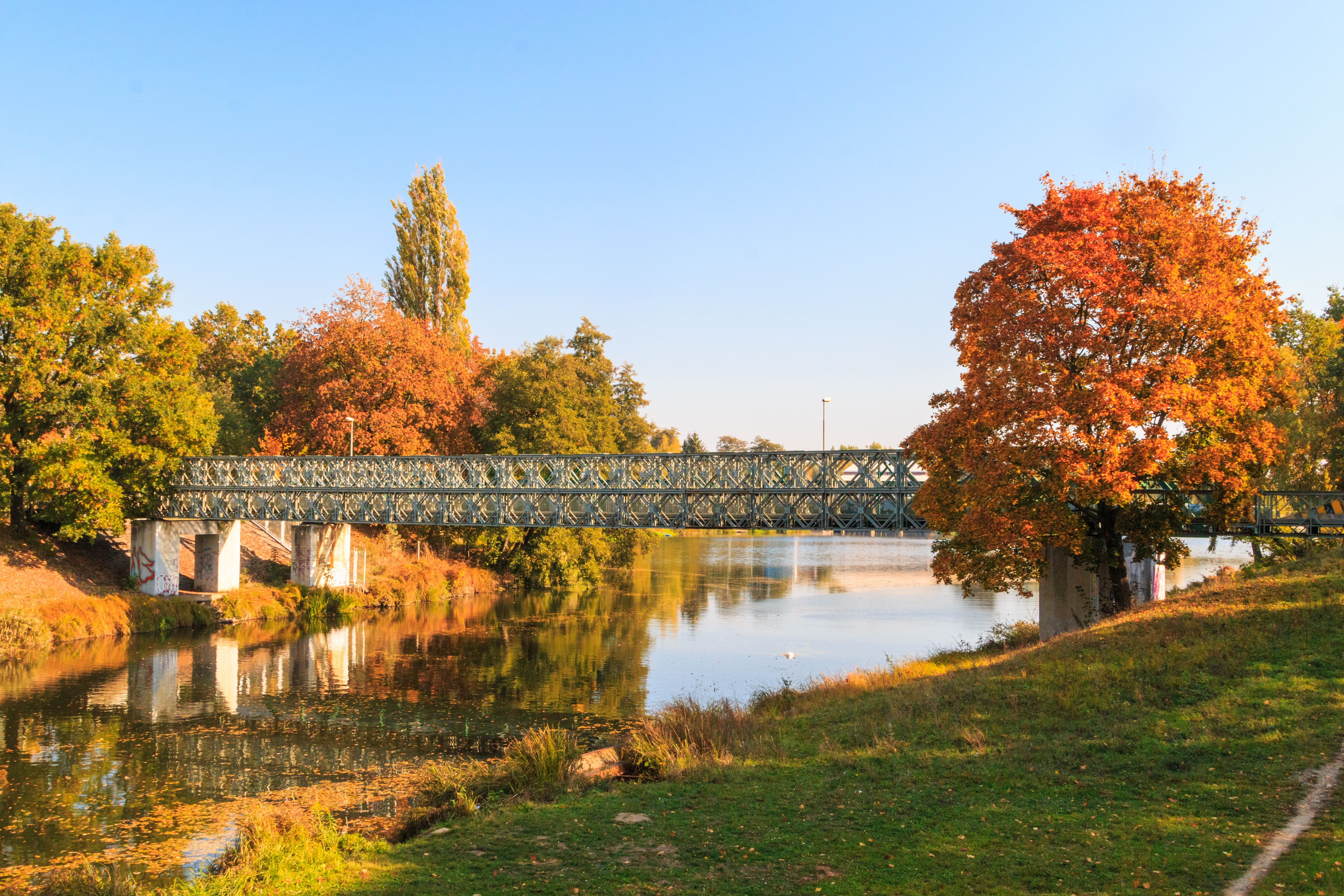 Most Klapák přes Orlici v Hradci Králové Pastviště (Malšovice)